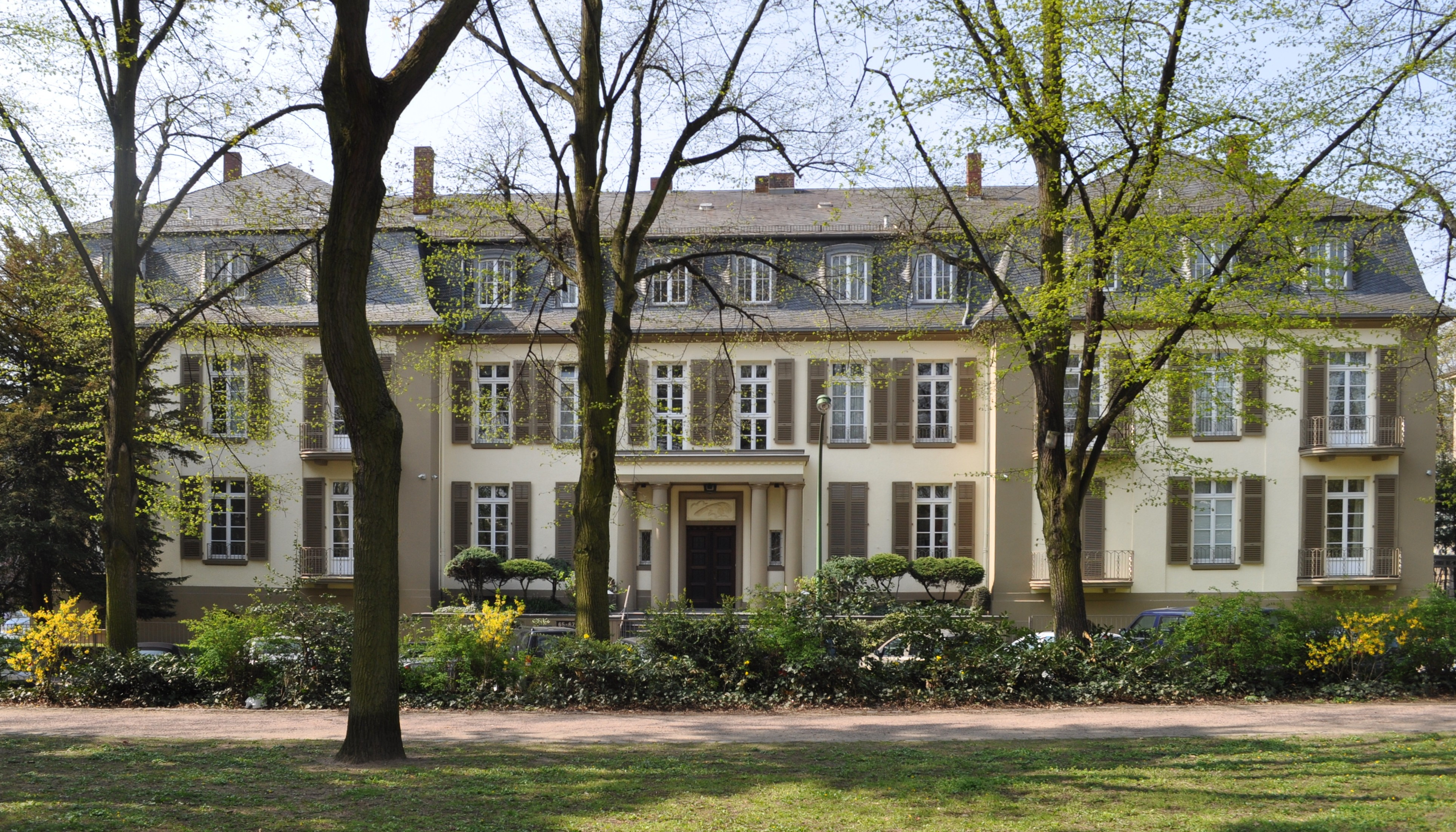 Frankfurt, Zeppelinallee 65-67. Denkmalgeschützte, repräsentative, neoklassizistische Villa von 1922-25 auf rechteckigem Grundriss mit symmetrischer Putzfassade und beidseitigen Flügelbauten unter hohem Mansarddach. Hohe Fenster zwischen Klappläden - an den Seitenflügeln z. T. als Türen hinter ziervergitterten Balkons; ursprünglicher Eingangsportikus.